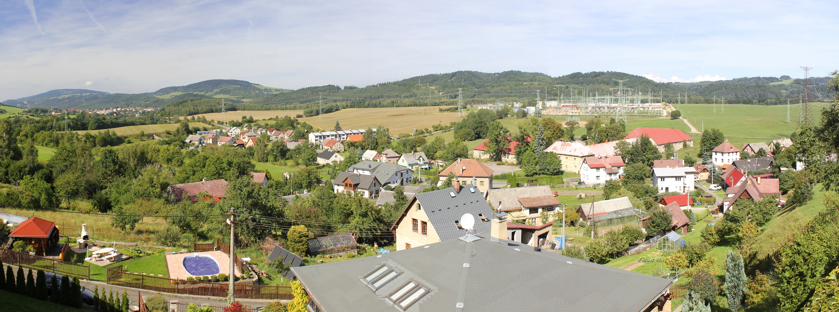 Jílové, v pozadí vlevo Hodkovice nad Mohelkou